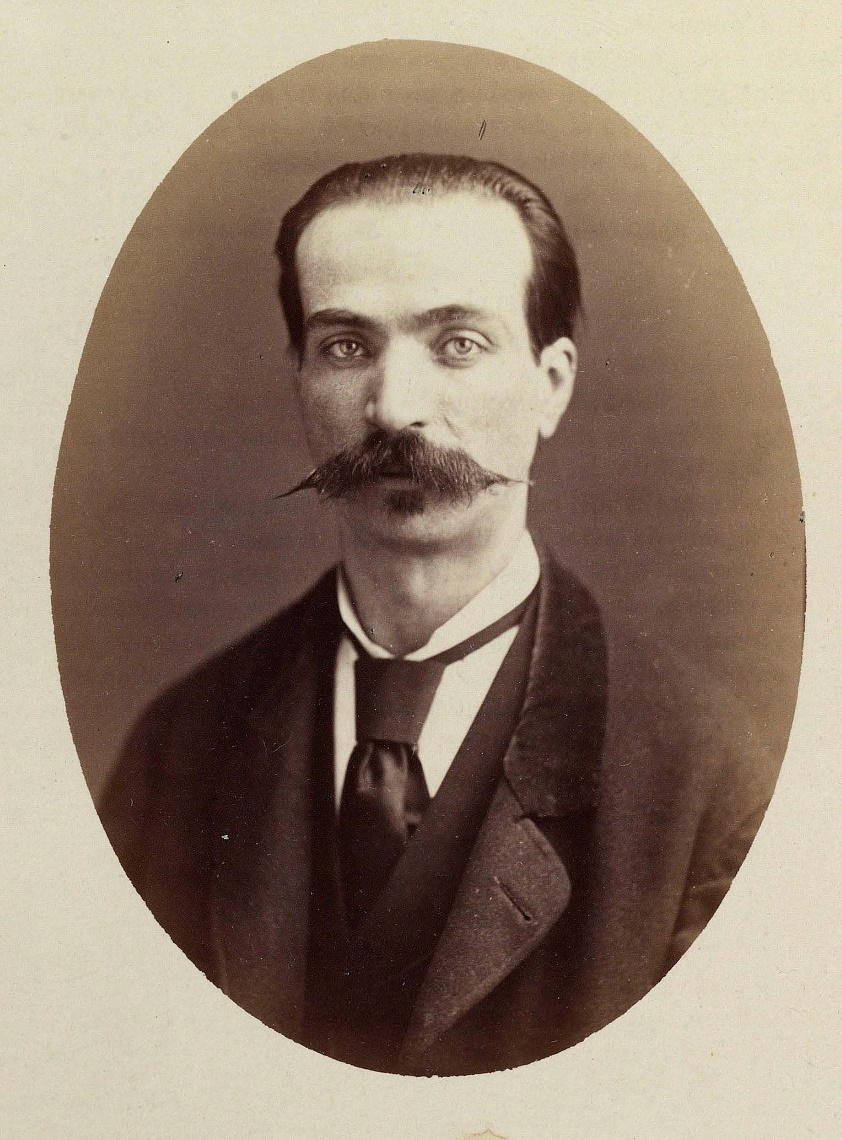 Nicolás Díaz y Pérez. Almanaque de E. Juliá para 1873. Biblioteca Nacional de España.